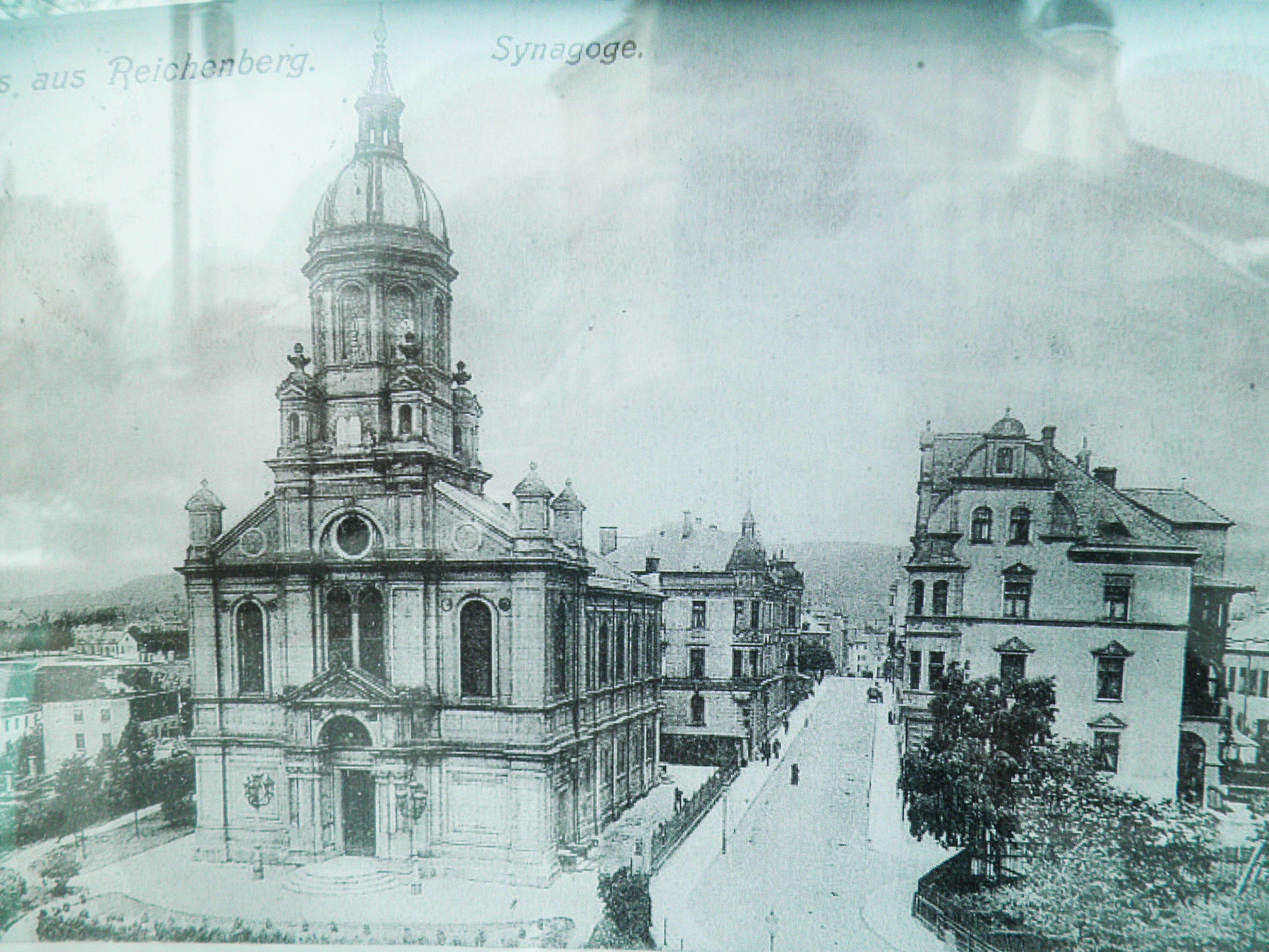 Stara synagoga v Liberci